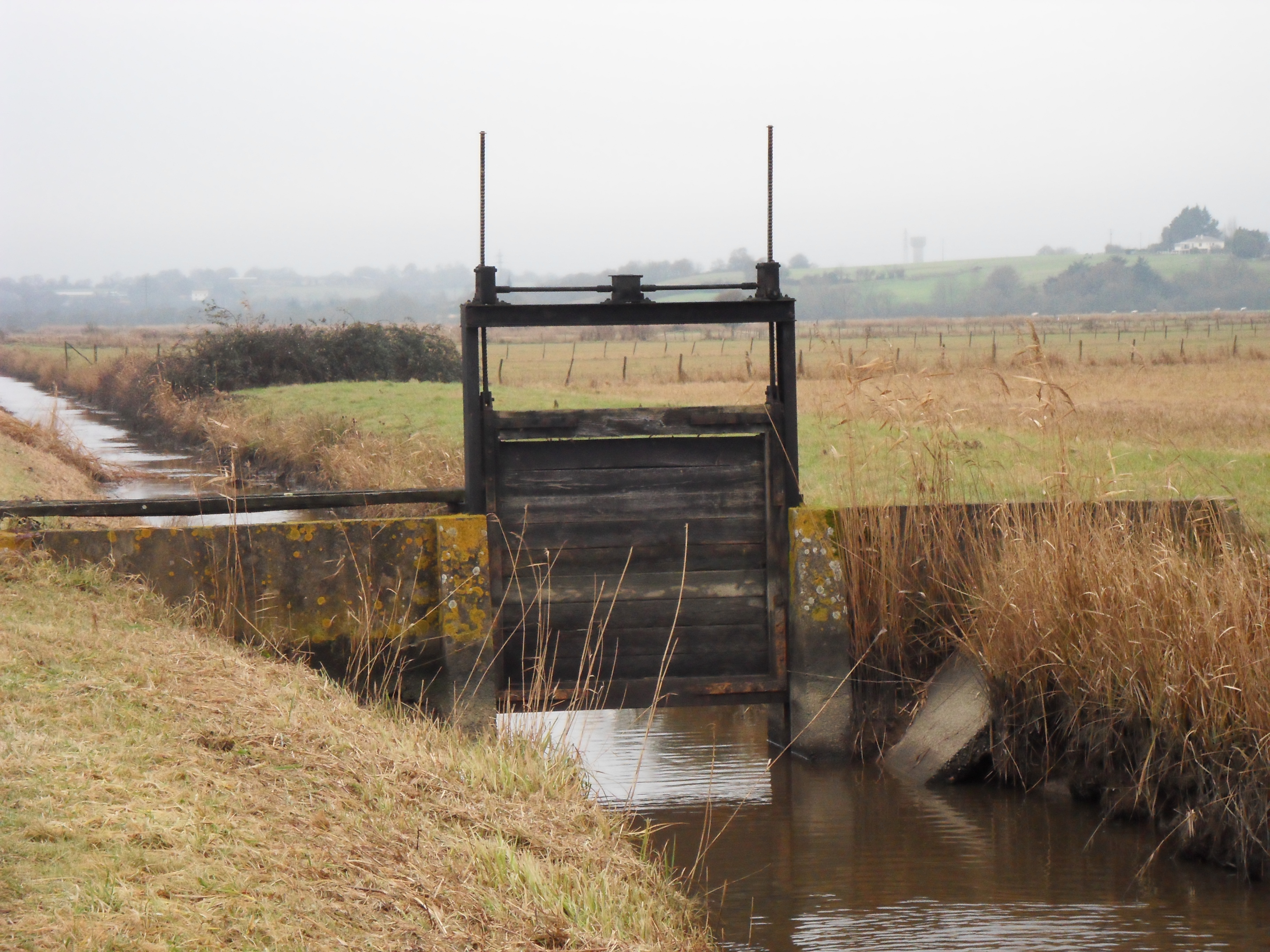 Écluse dans les marais de Frossay, Loire-Atlantique, France.